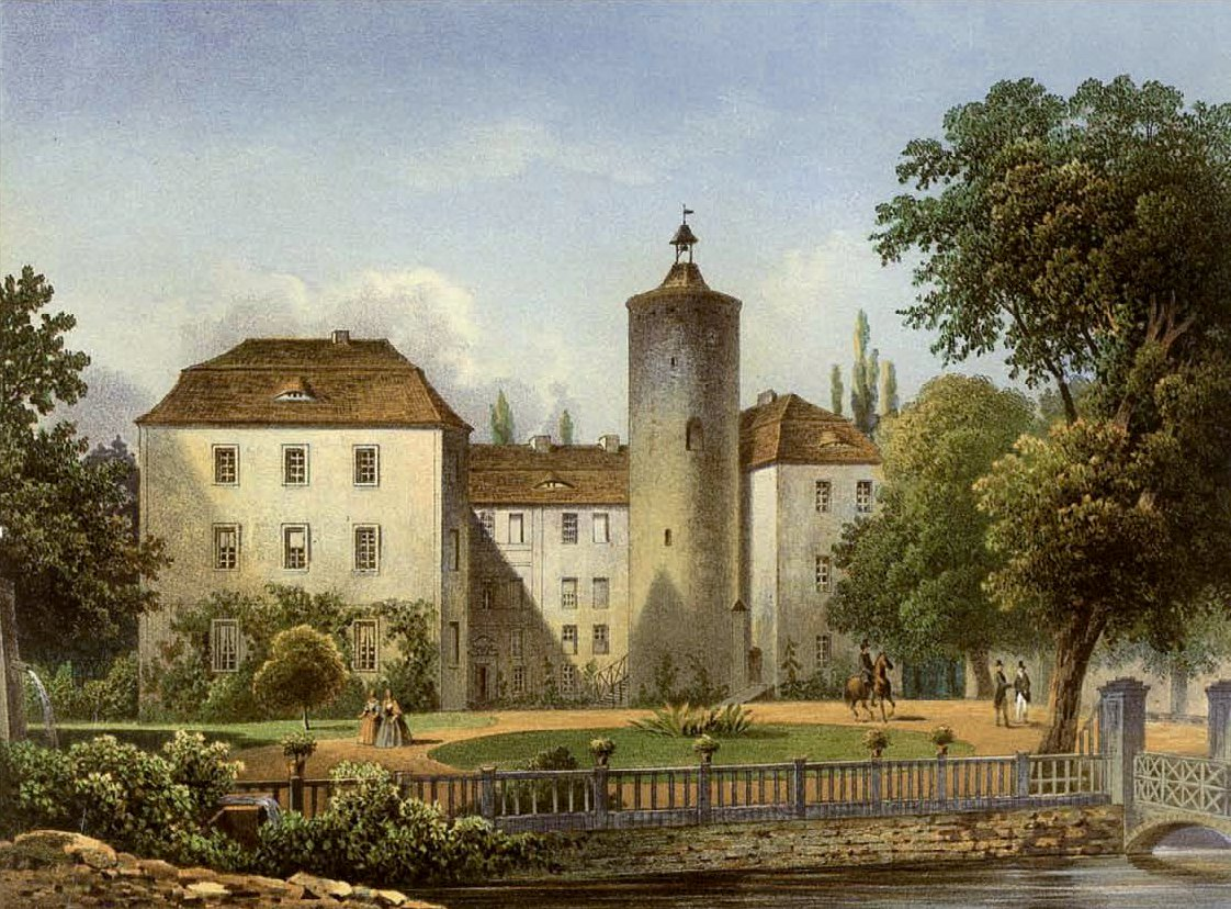 Schloss Bornsdorf, Kreis Luckau, Provinz Brandenburg, Lithografie aus dem 19. Jahrhundert